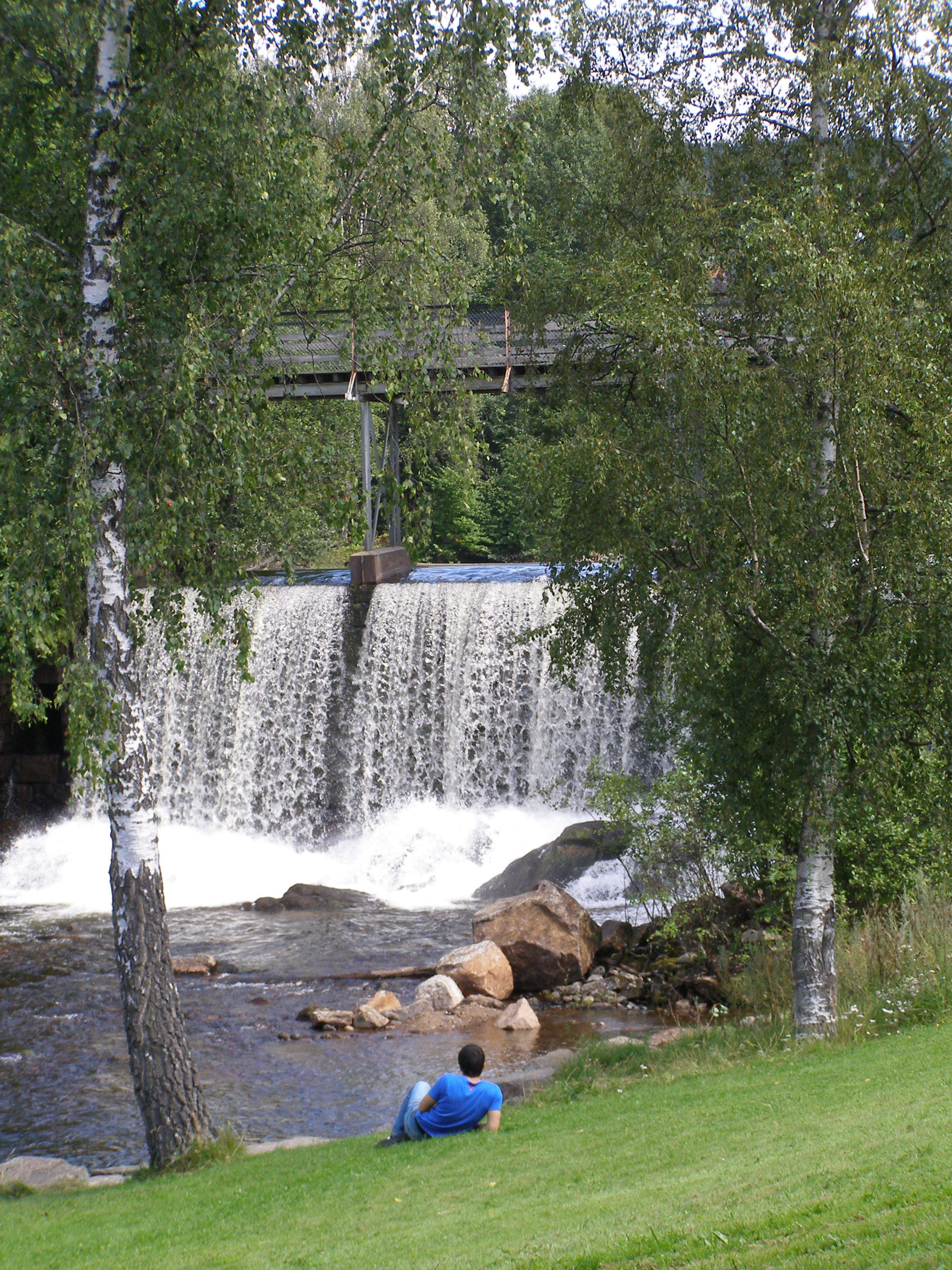 Brekkefossen i Oslo